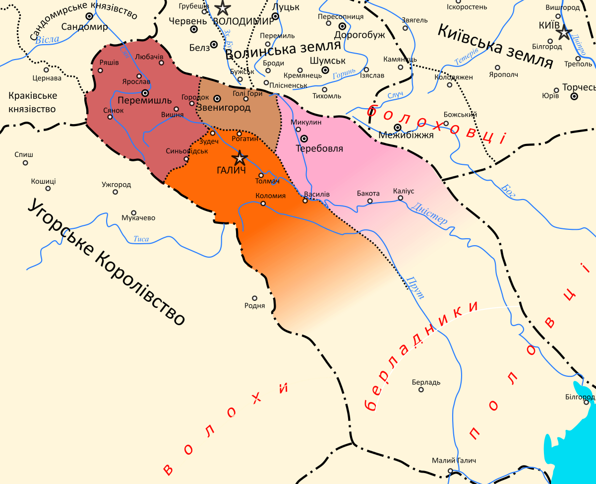 Галицька земля у XI-XIII ст.